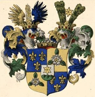 Ungern-Sternbergi suguvõsa vabahärravapp